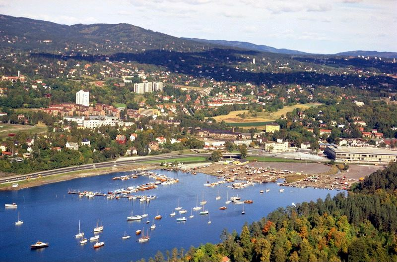 Bestumkilen med Drammensveien fra venstre og Norges Varemesse og Sjølystveien til høyre. Hoff og Silkstrå i bakgrunnen. (Flyfoto).